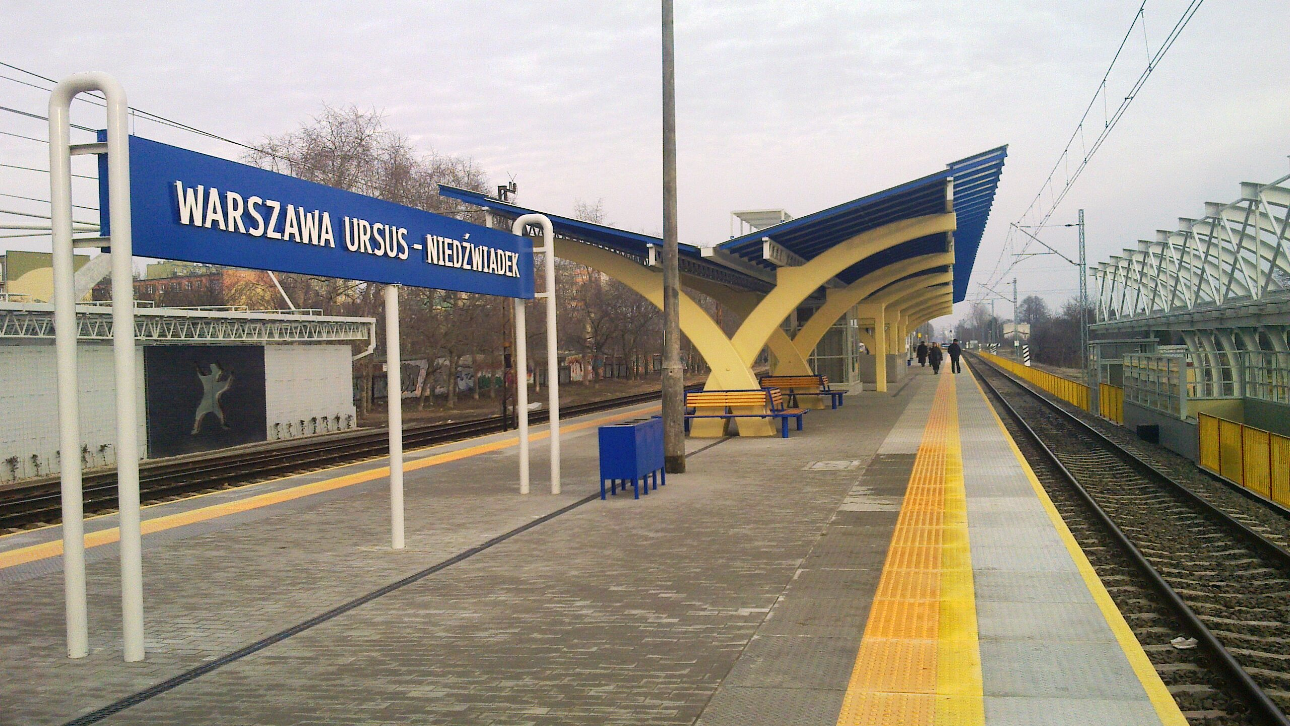 Peron przystanku kolejowego Warszawa Ursus-Niedźwiadek.